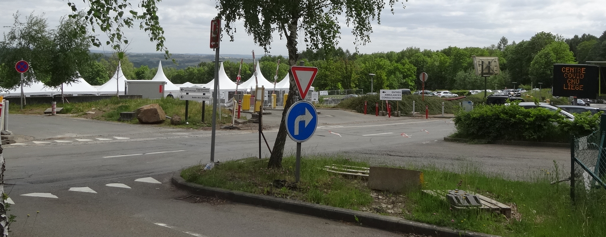 Centre de dépistage Covid-19 au CHU de Liège